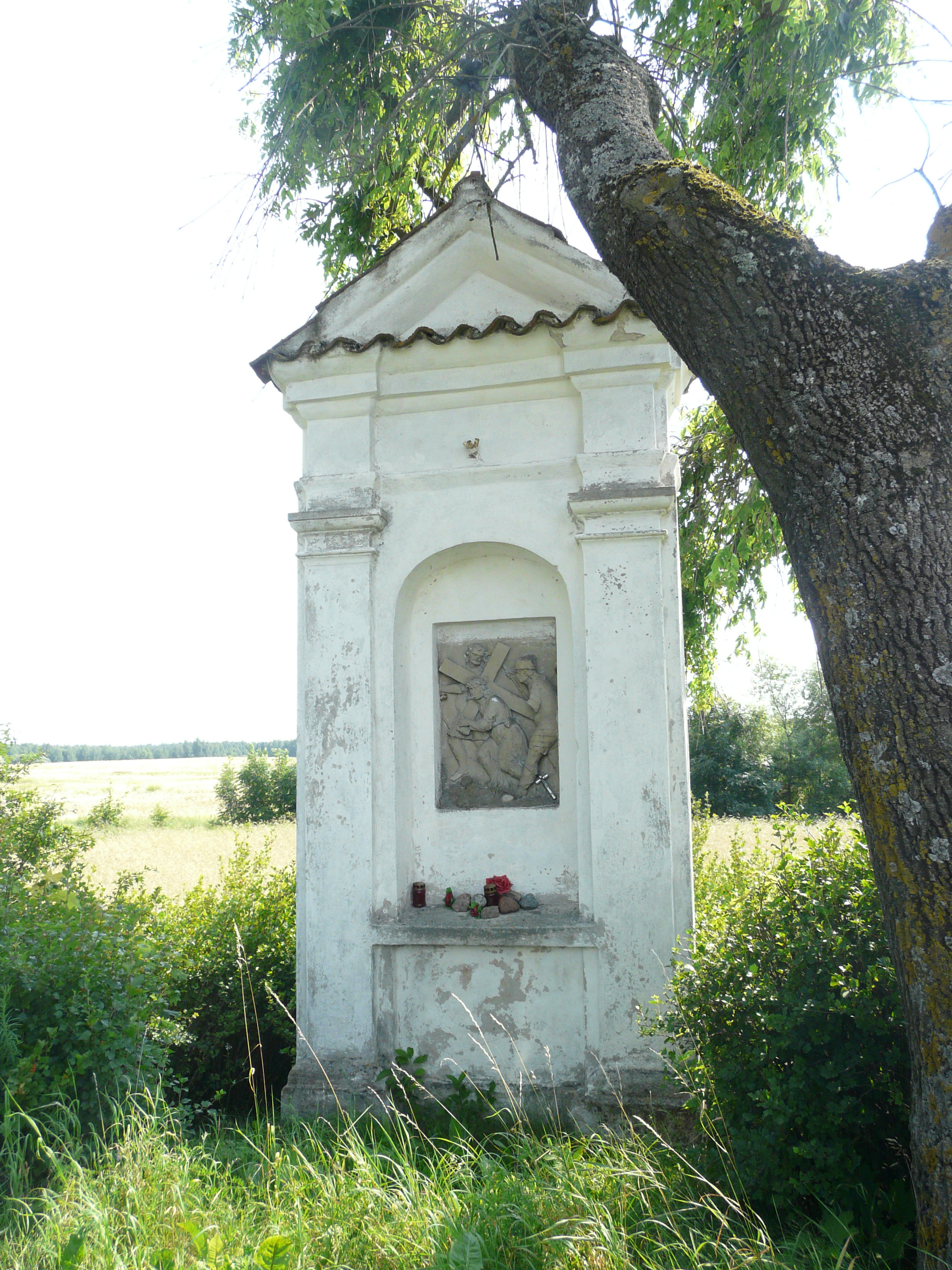 Droga Pielgrzymkowa Reszel - Święta Lipka: kapliczka różańcowa IX, 1734 (Dźwiganie krzyża na Kalwarię)